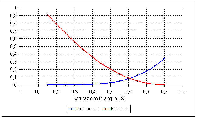 esempio di permeabilità relative in un sistema olio-acqua. Realizzato da me.